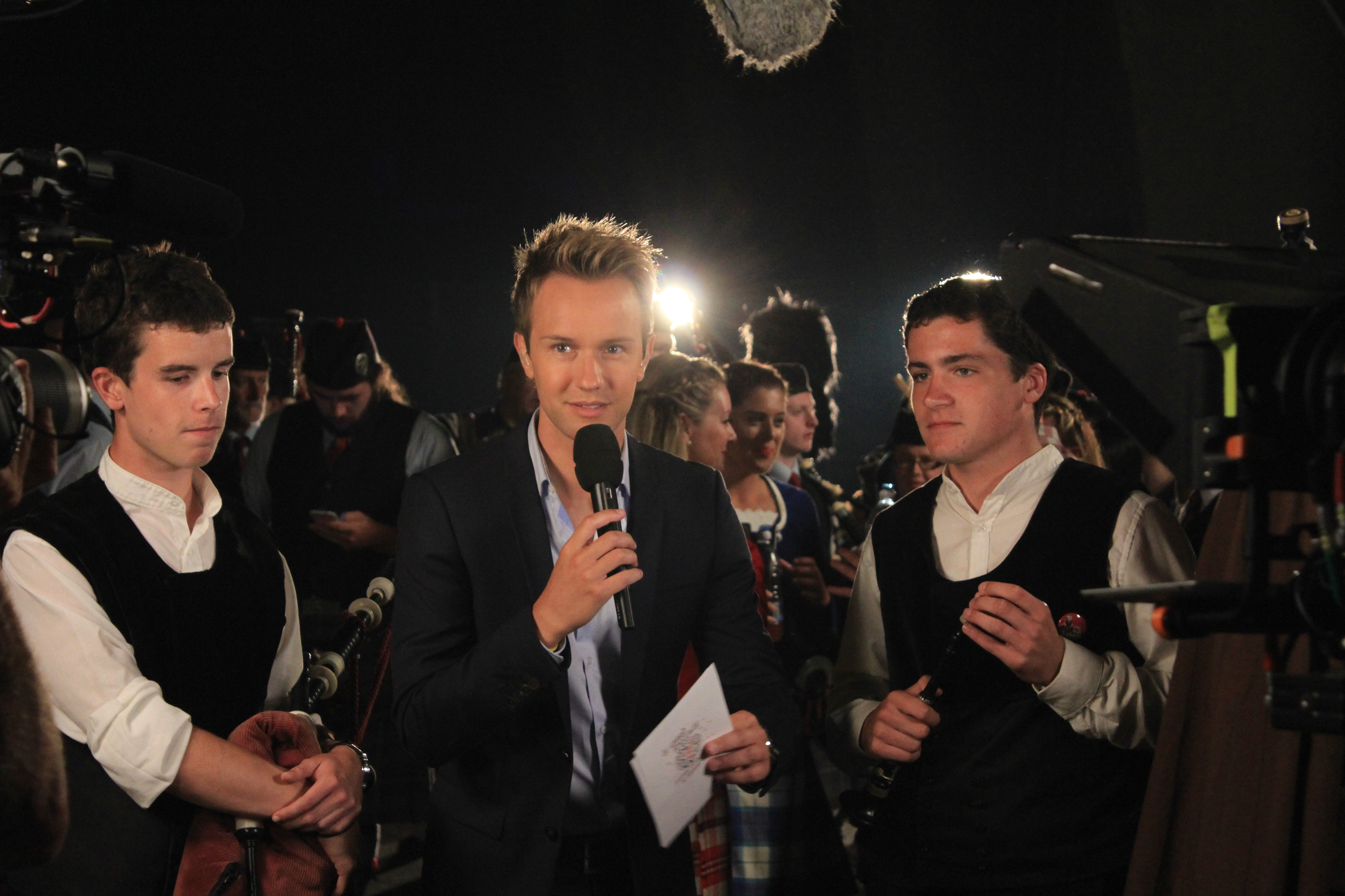 Cyril Féraud et des musiciens du bagad de Lorient pendant le festival interceltique de Lorient.